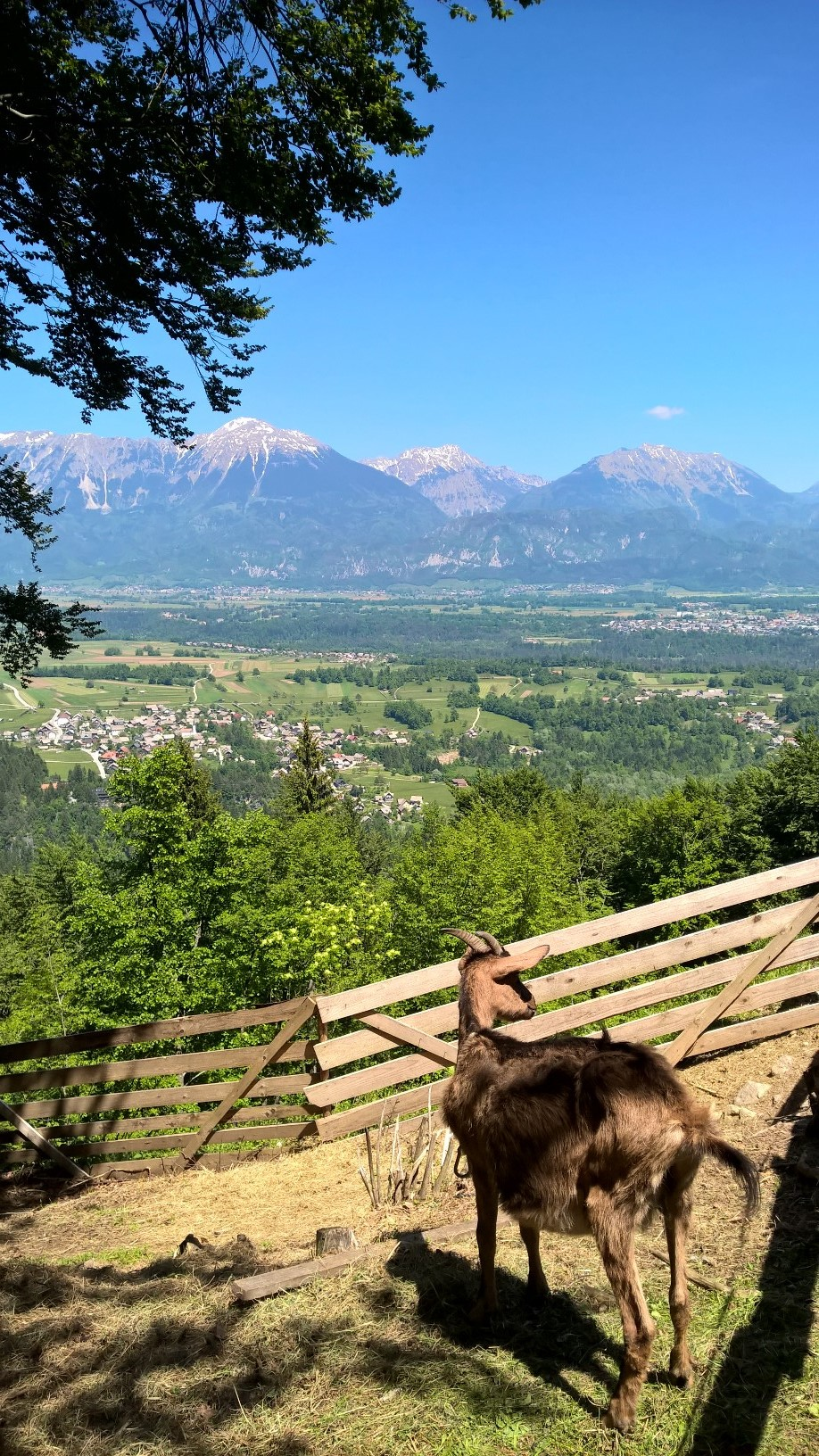 Pogled iz Taleža na Ribno. Fotografija posneta 22.5.2016.